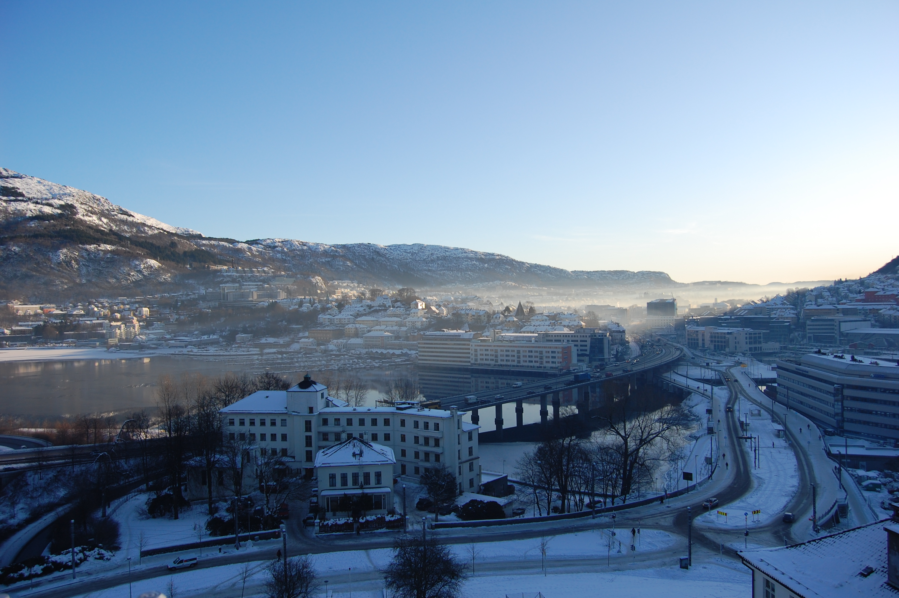 Bilde tatt mot sørøst. Florida sykehus og Nygårdsbroene i forgrunnen. Store Lungegårdsvann bak og Bergensdalen mot høyre i bildet ligger innhyllet i forurensing. Haukeland sykehus skimtes til venstre i bildet. Da bildet ble tatt ble det på Danmarksplass målt følgende: NO2: 363 µg/m3; PM10: 138,1 µg/m3 og PM2.5: 113,8 µg/m3 samt en uvanlig værtype med kuldeperiode og flere dager med stille vær